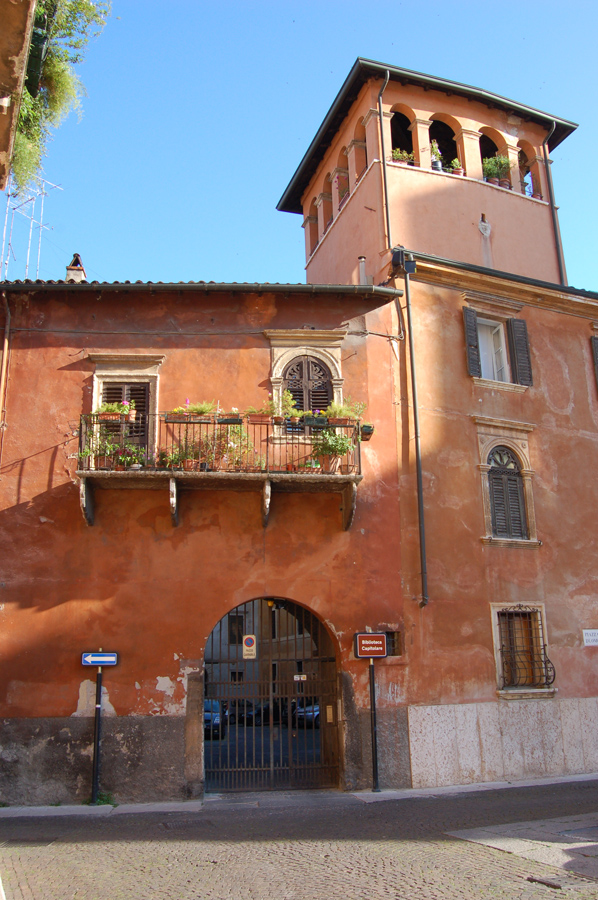 Fotografia della biblioteca capitolare di Verona